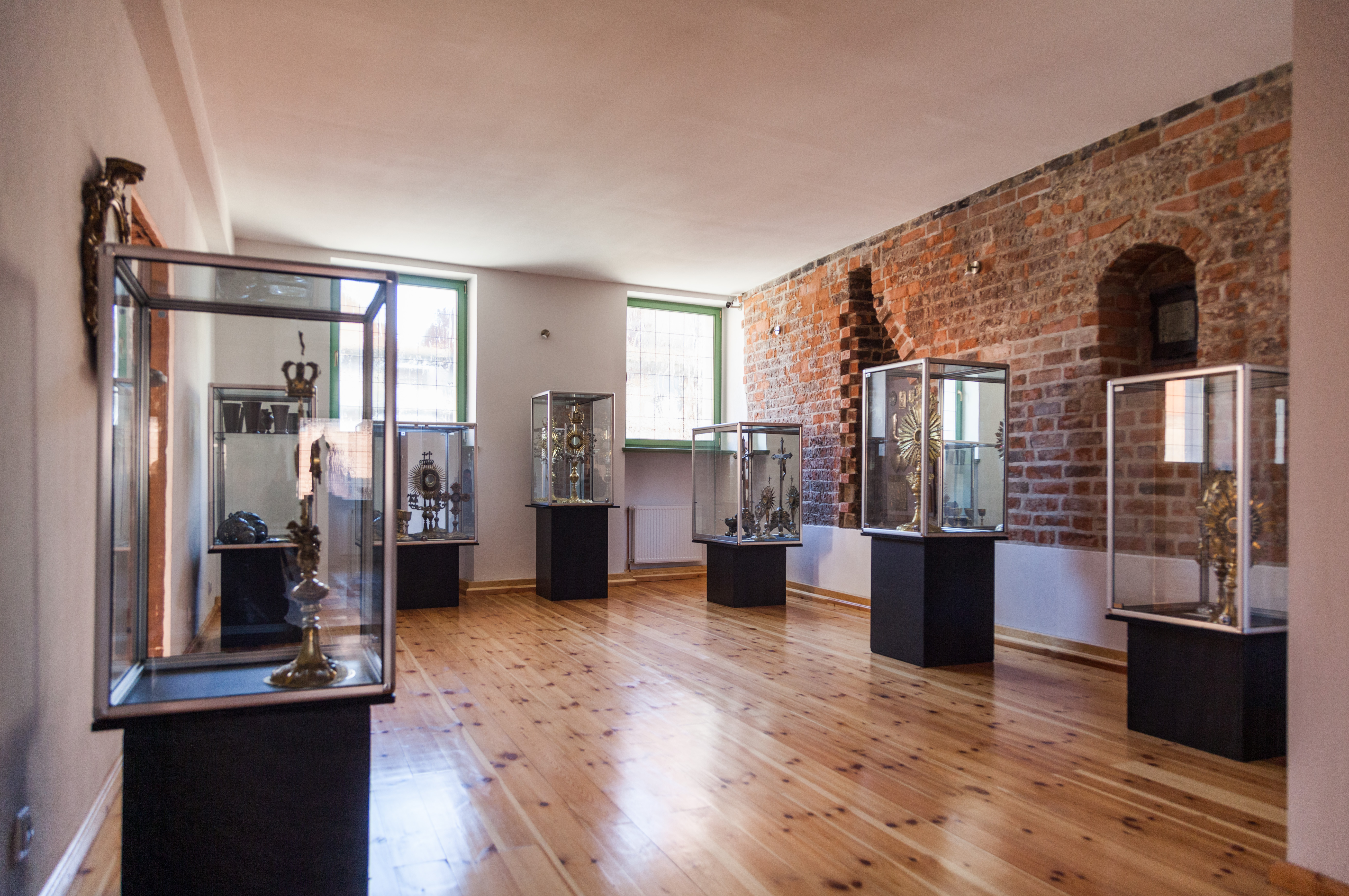 Wnętrze Muzeum Diecezjalnego w Toruniu, ul. Żeglarska 7.